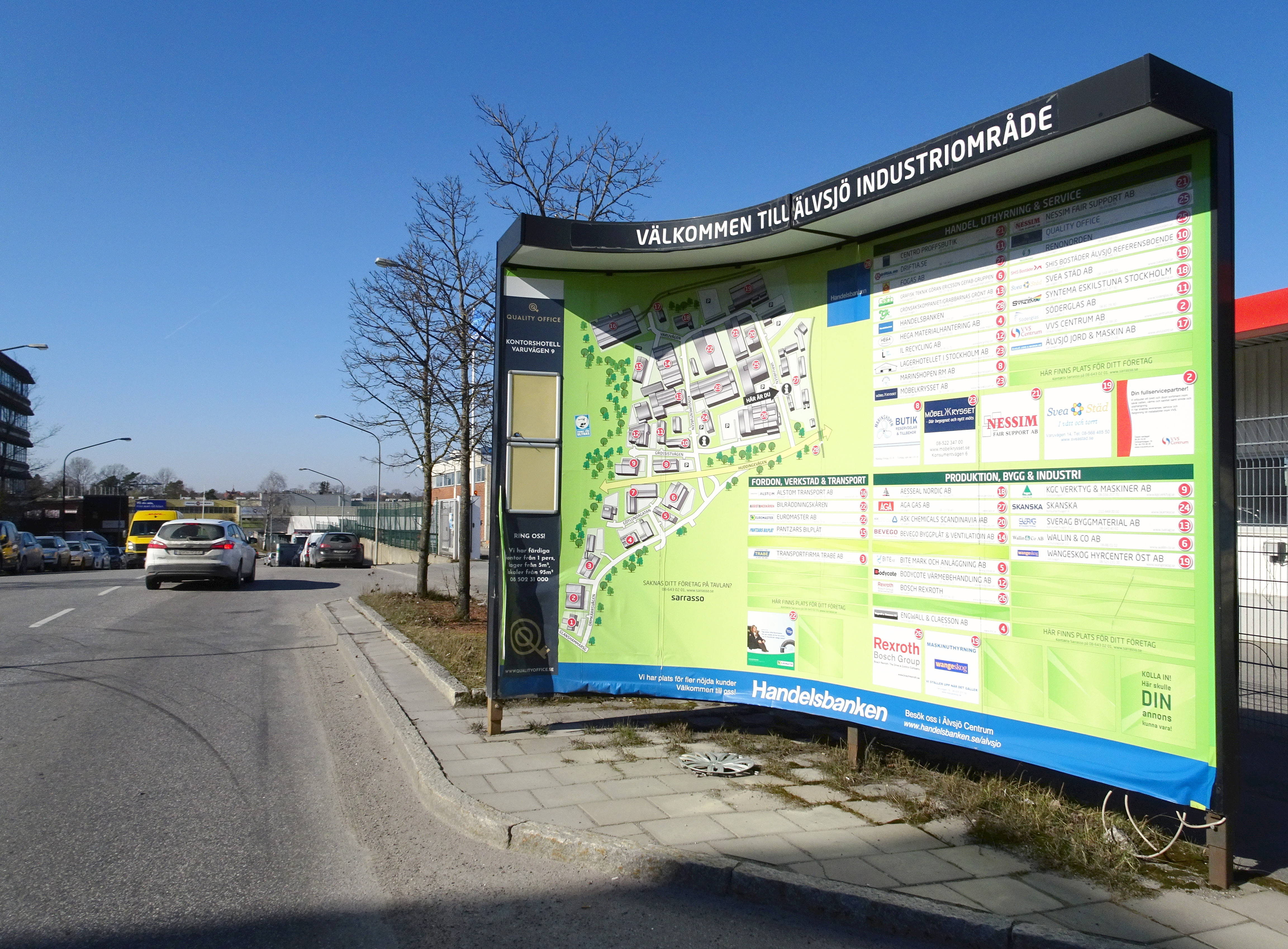 Älvsjö industriområde, Södra Stockholm